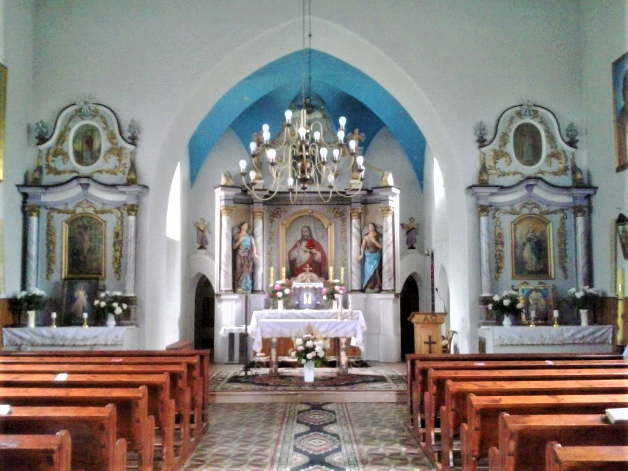 Kościół Świętego Michała Archanioła w Pokrzywnicy koło Piły.